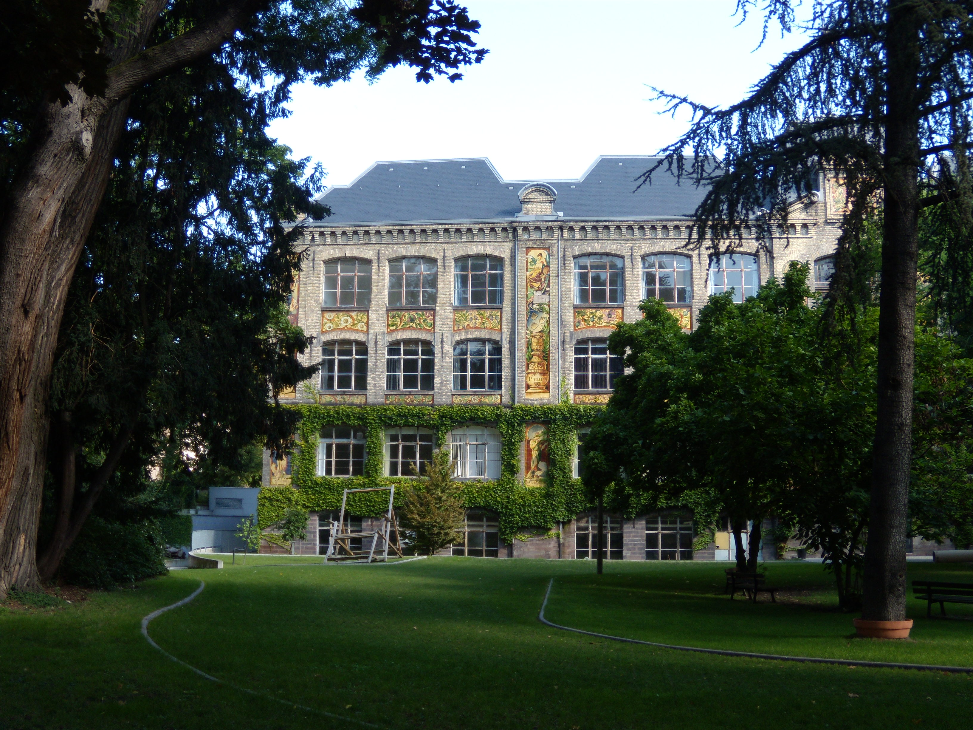 Façade de l'école supérieure des arts décoratifs de Strasbourg.